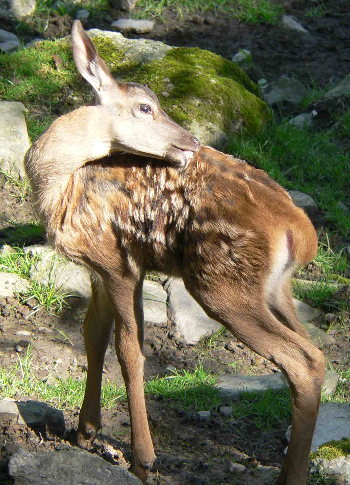 Cervus elaphus, calf